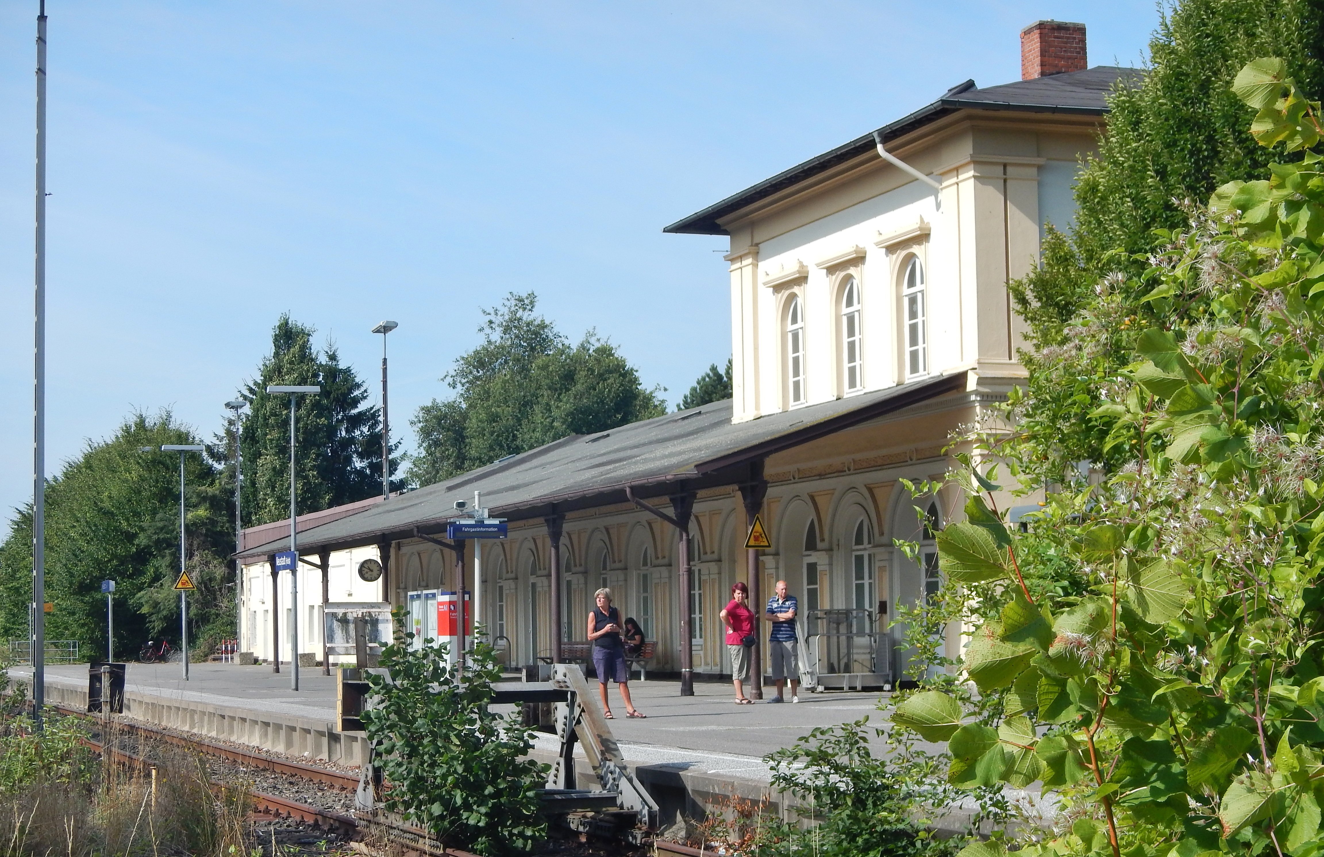 Bahnhof Neustadt